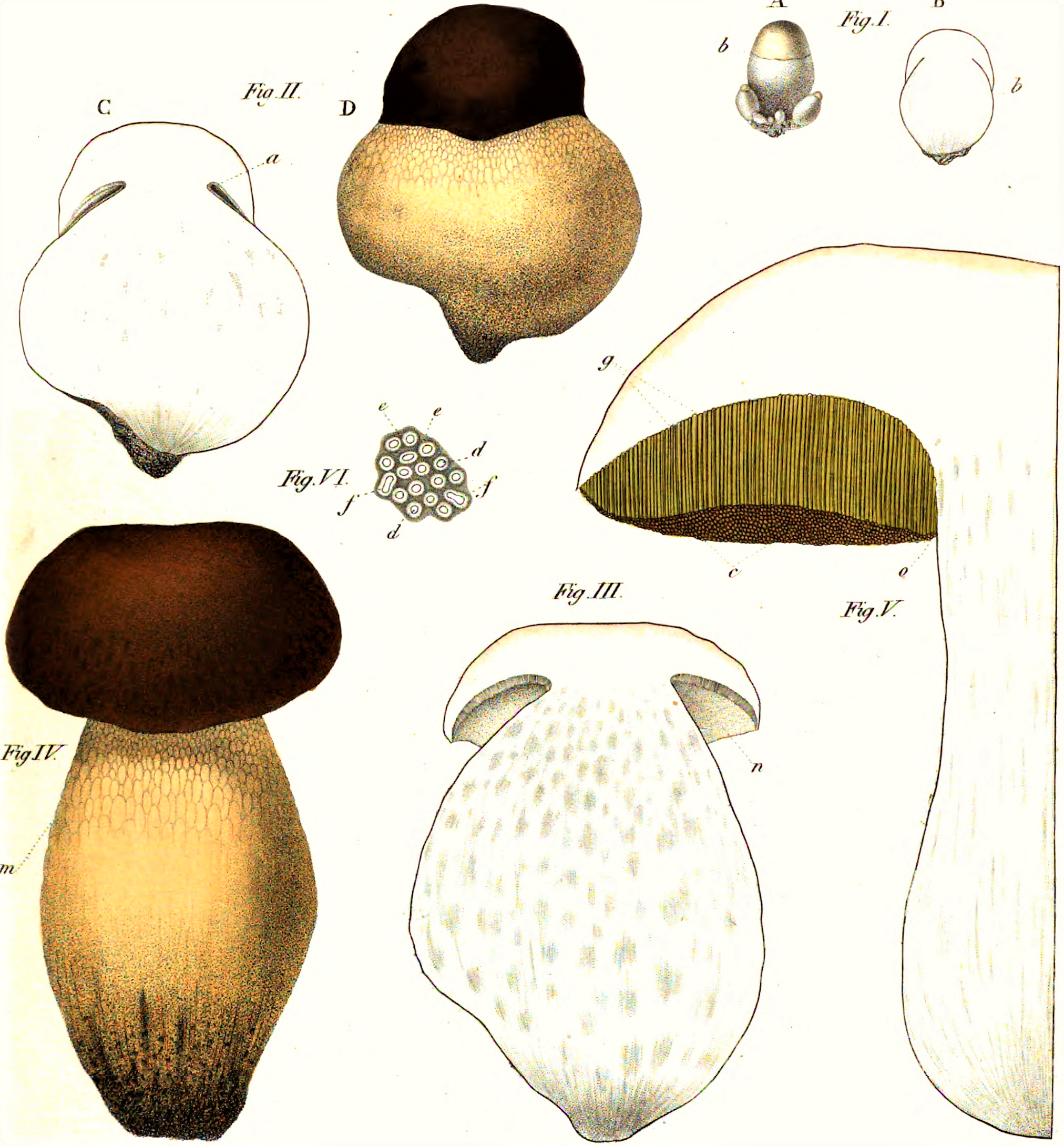 Carlo Vittadini: Boletus edulis (1835)